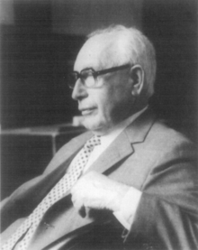 Adolph Pavlovich Yushkevich